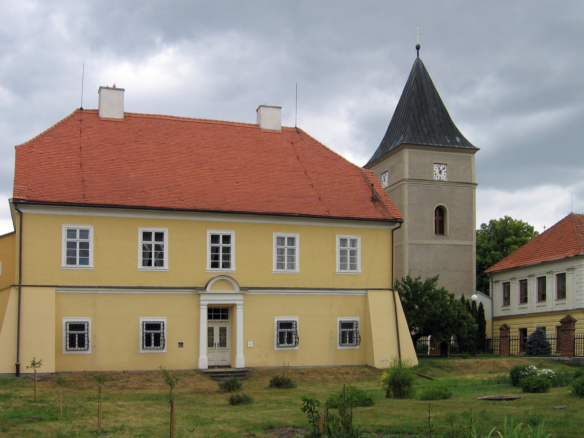 Mohelno - fara a kostelní věž.